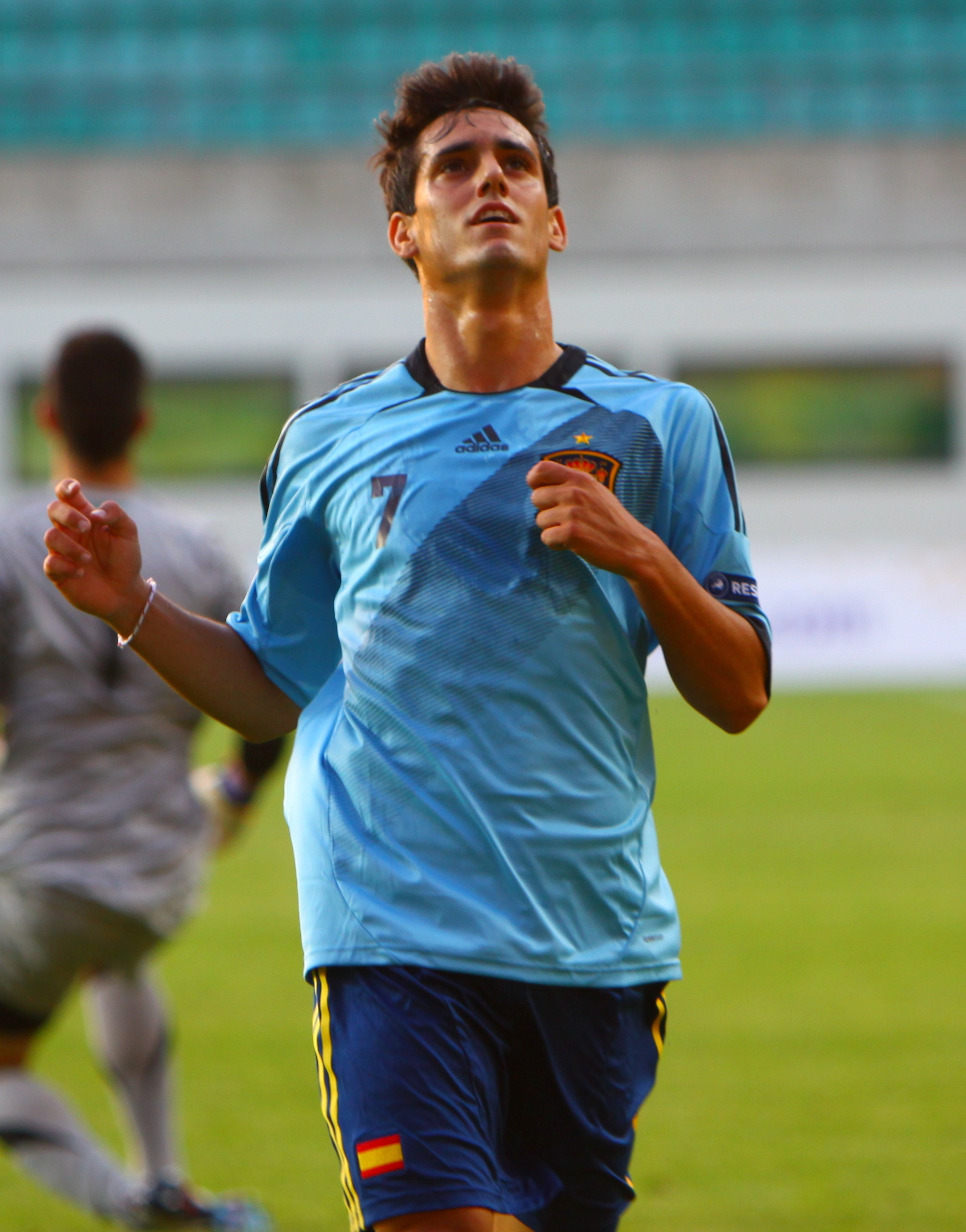 U-19 Portugal vs Spain.